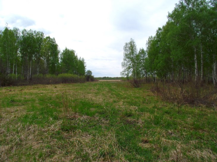 Аевский волок, Большеуковский район This image is related to the protected area of Russia number 5520004